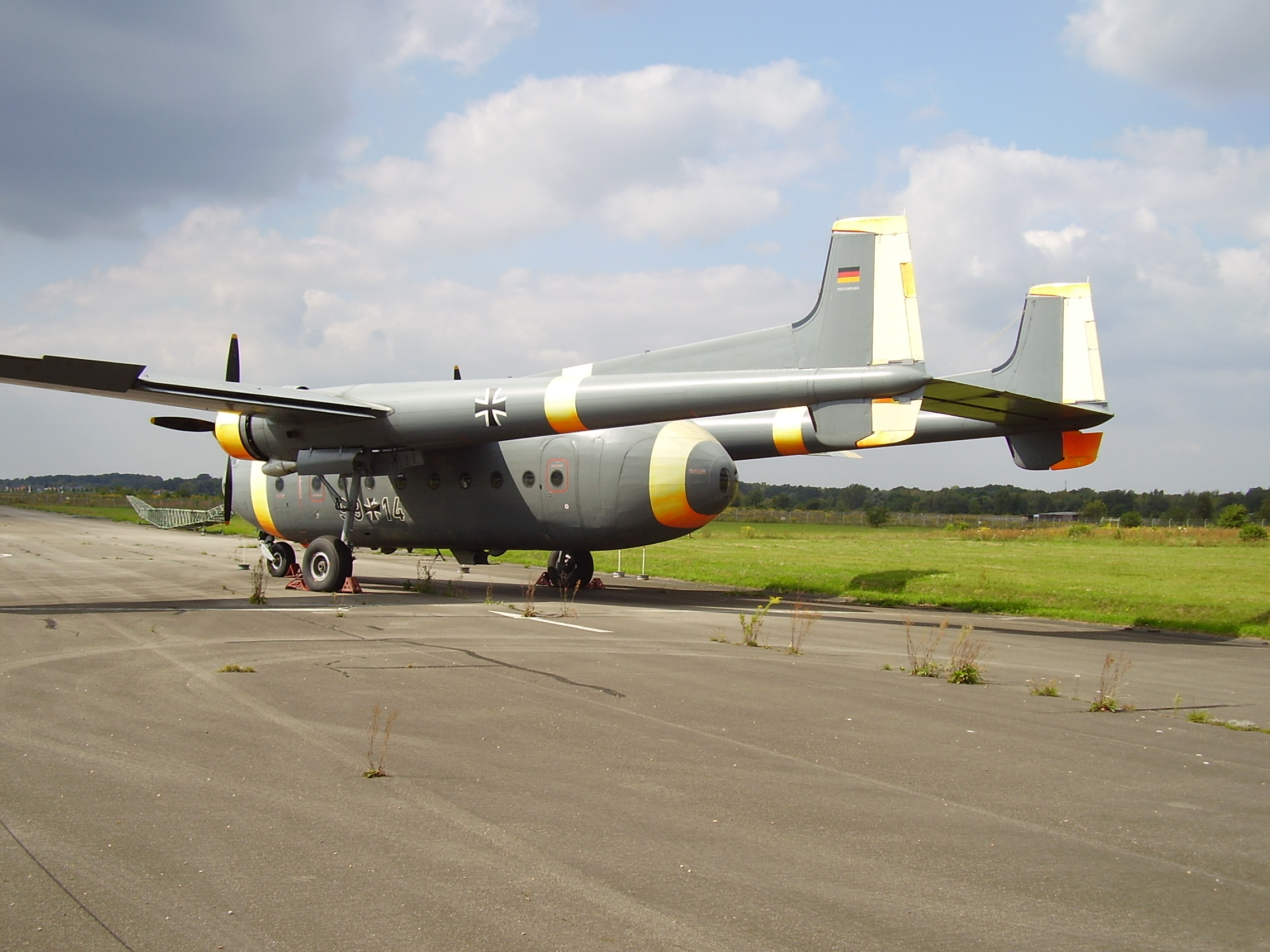 Nord 2501 Noratlas at the Luftwaffenmuseum der Bundeswehr; Airforce Museum of the Bundeswehr; Berlin-Gatow, Nord 2501 Noratlas